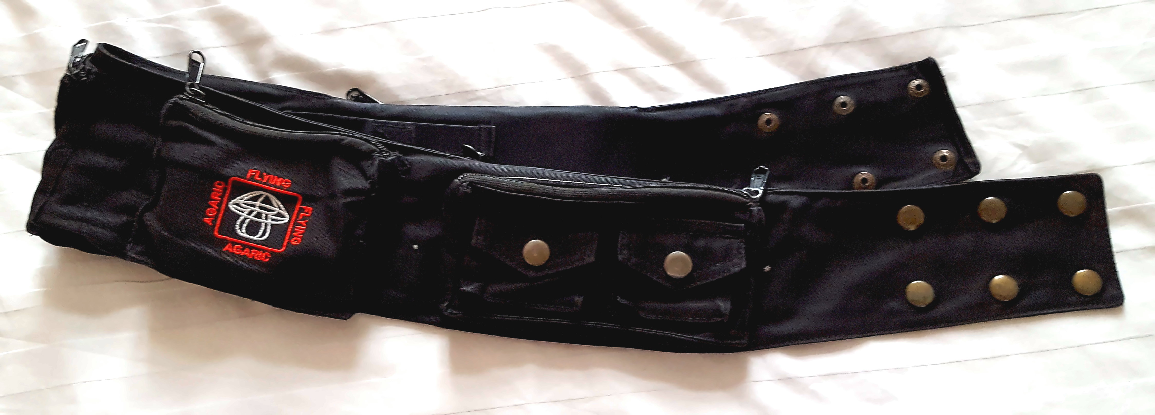 Geldgürtel mit mehreren kleinen Taschen.